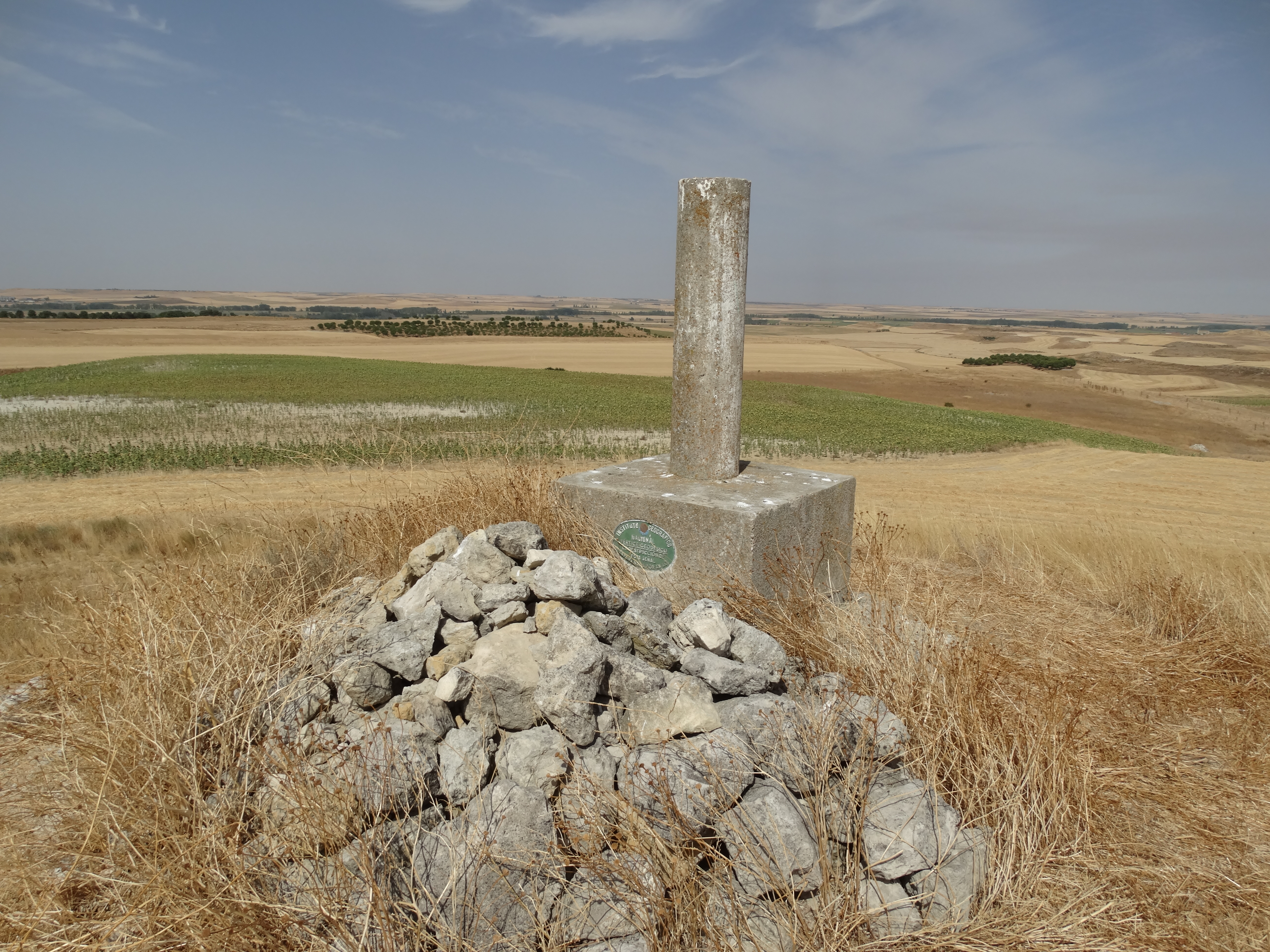 Paraje de El Moclín (en el propio teso de este nombe) en Medina de Rioseco, provincia de Valladolid (España). Este paraje fue testigo de la batalla de Rioseco entre los ejércitos españoles y franceses (guerras napoleónicas). El lugar es considerado BIC (Bien de Interés Cultural).